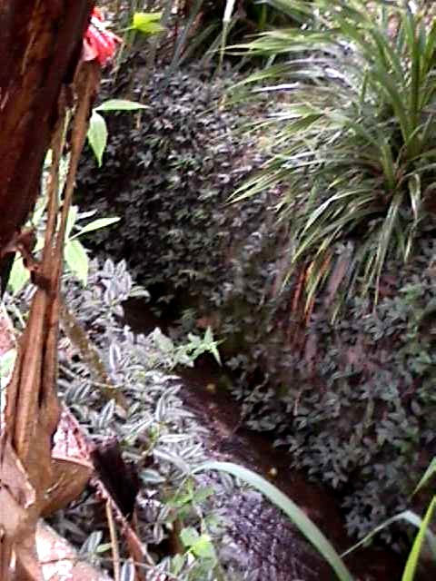 Lecho de la Quebrada La Boyera a nivel del Polideportivo